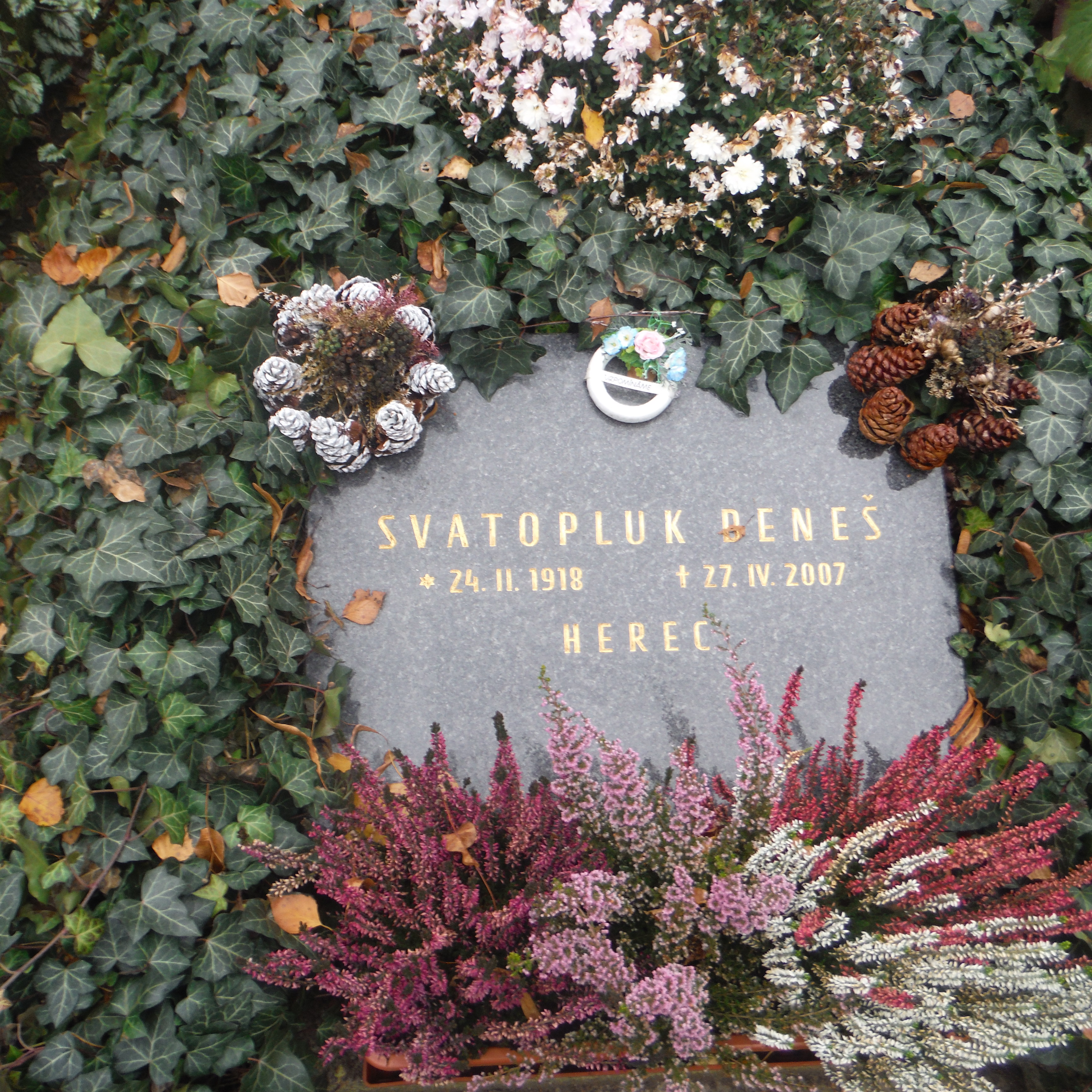 hrob